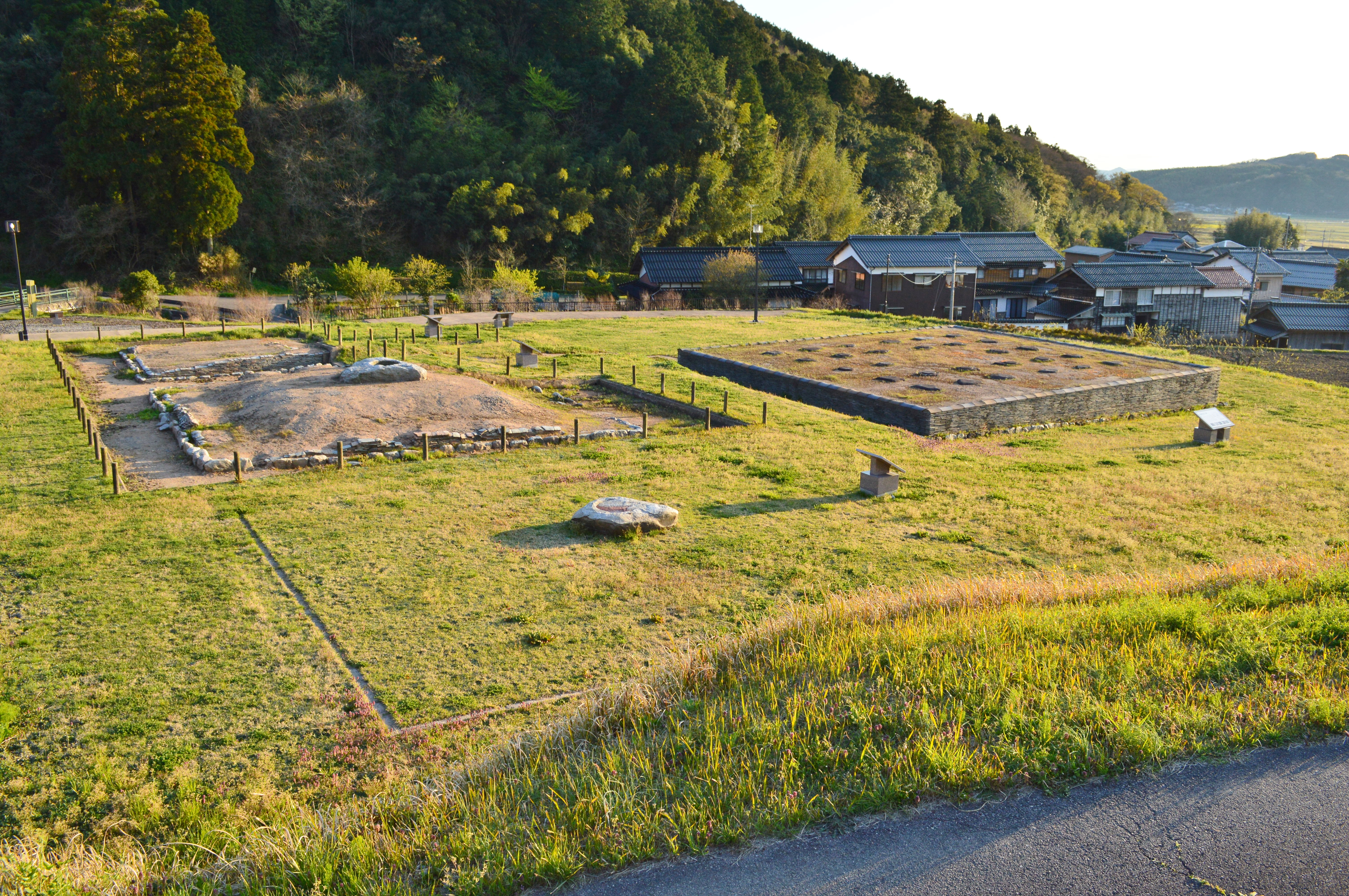 上淀廃寺跡 全景 Nikon D3200